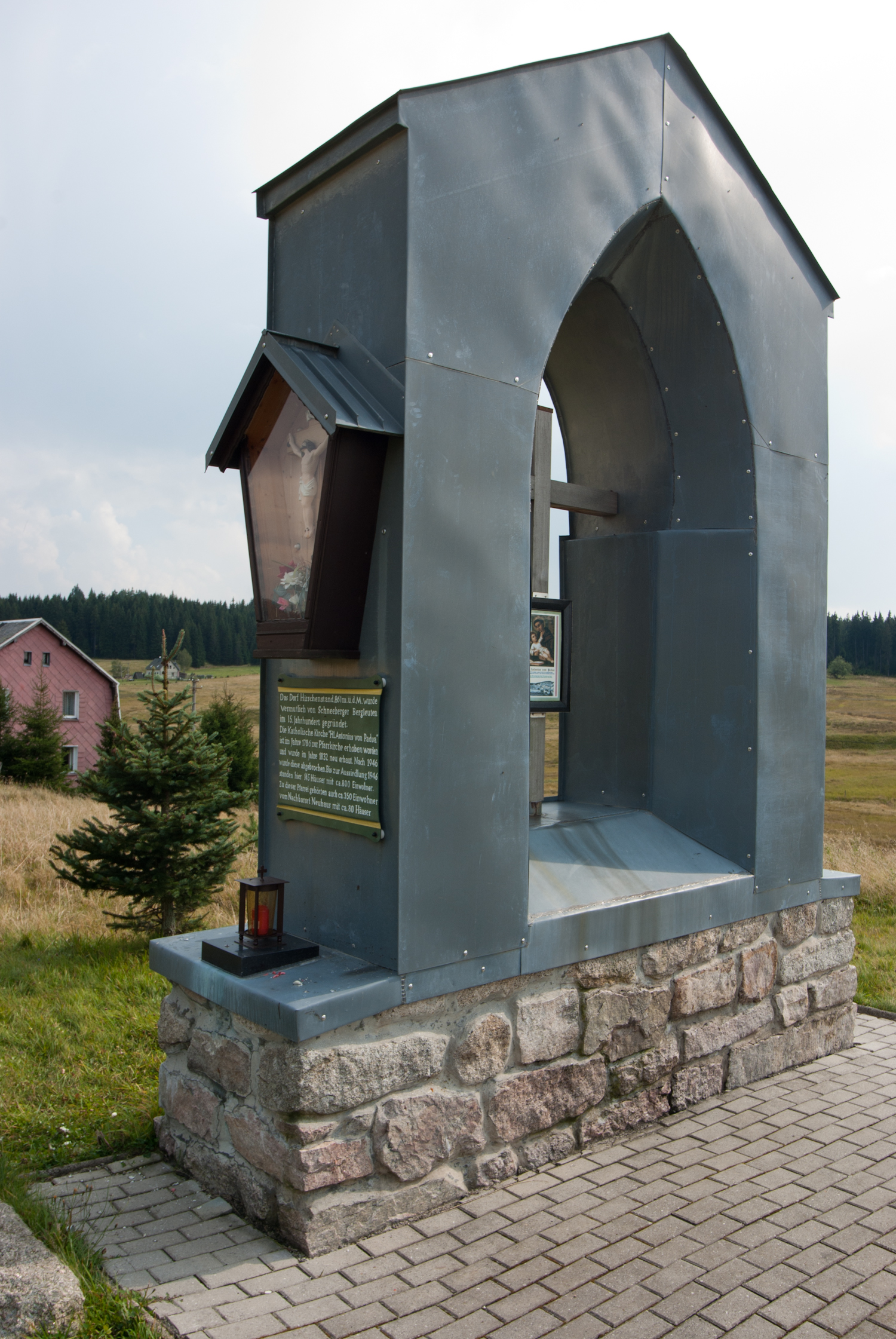 Jelení, Krušné hory, památník na místě bývalého kostela; více